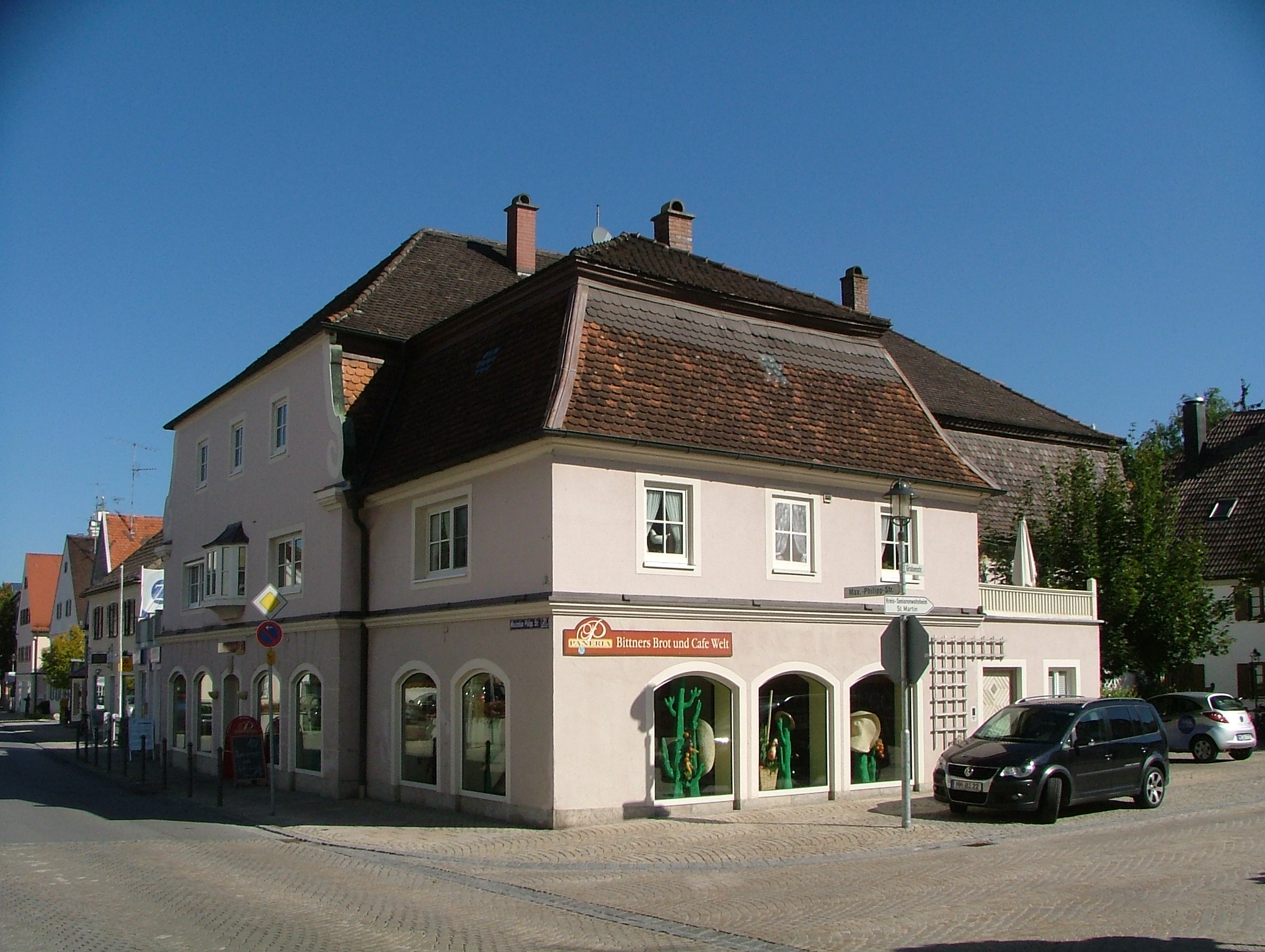 Türkheim